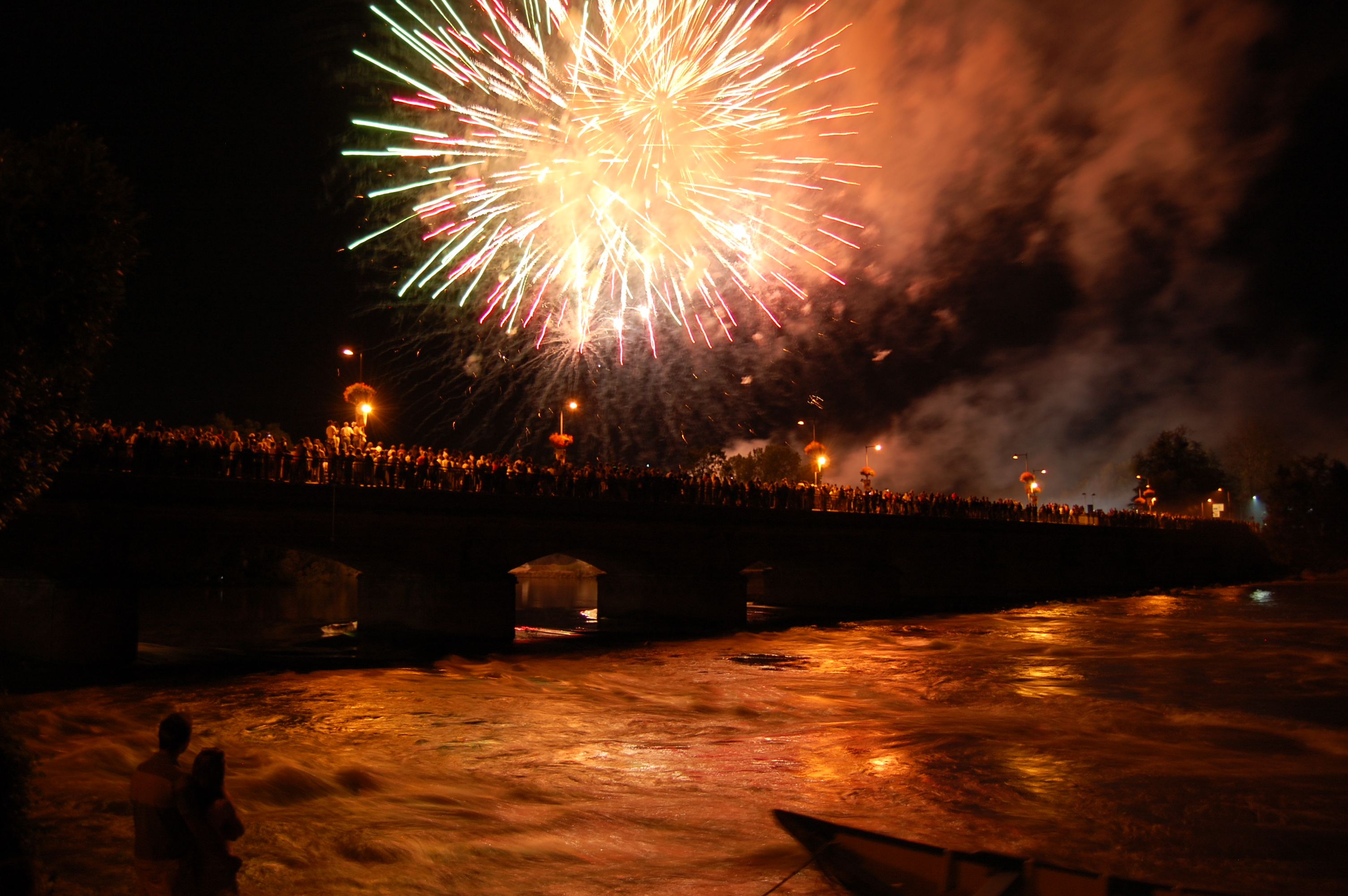 Gente assiepata sul ponte sull'Adda, ad assistere allo spettacolo pirotecnico in occasione della terza notte bianca del comune di Lodi